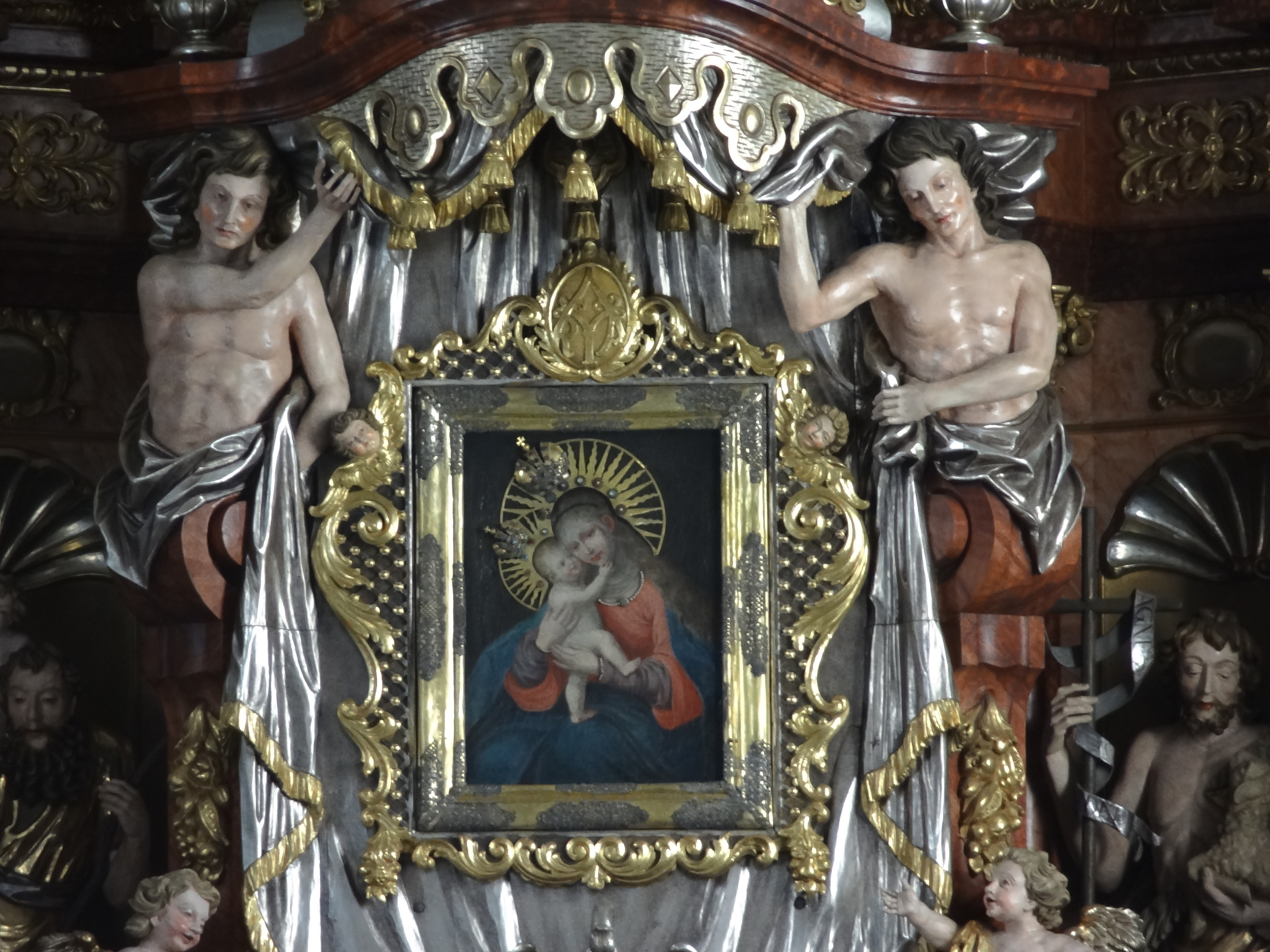 Detail des Hochaltars - Gnadenbild aus dem 19. Jahrhundert nach Vorlage aus dem 14. Jahrhundert